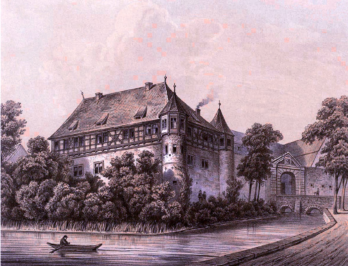 Wasserburg Deuna, Kreis Worbis